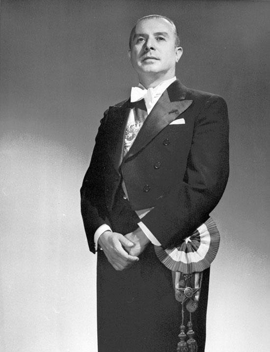 Fotografía oficial de Gabriel González Videla, Presidente de Chile (1946-1952), durante su mandato.